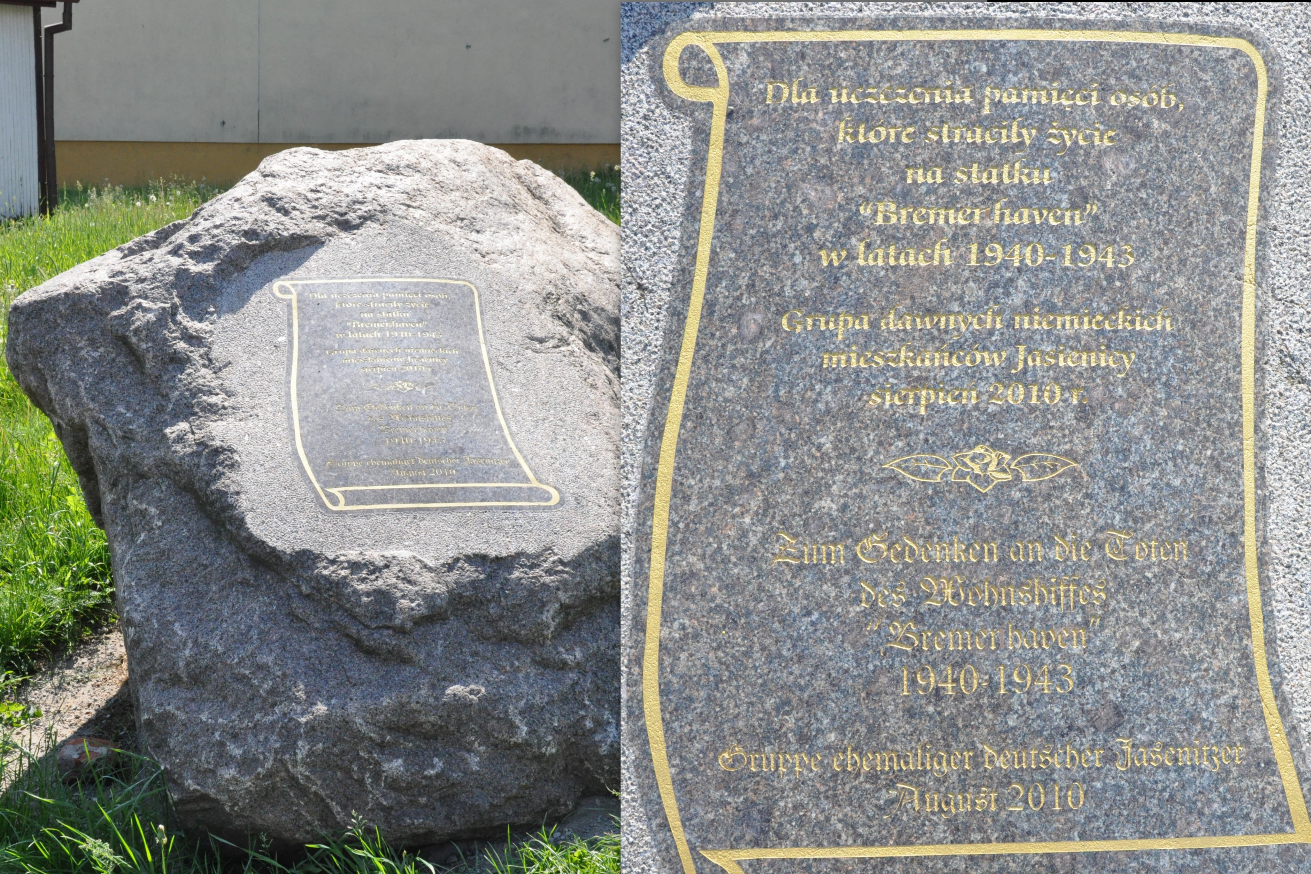 Obelisk pamiątkowy w Policach